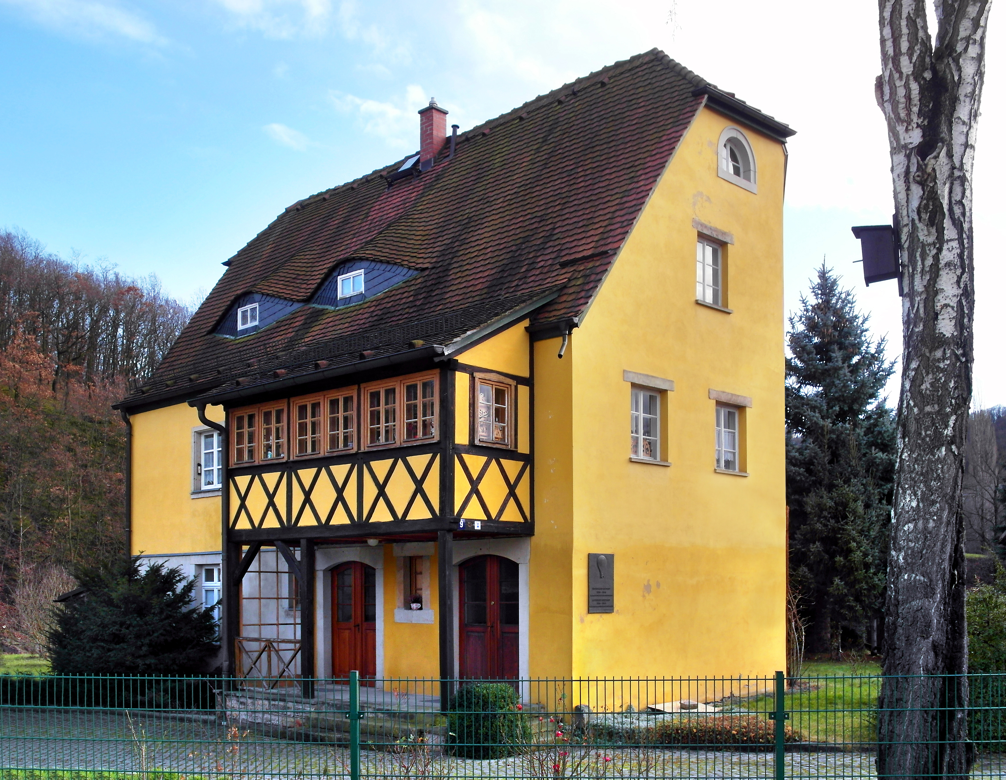 03.01.2018 01705 Freital-Döhlen, Reichardstraße 9 (GMP: 51.007574,13.660712): In diesem Haus wohnte von 1814 bis zu ihrem Tode am 22.02.1848 Wilhelmine Reichard und ihr Mann Gottfried Reichard. Wilhelmine Reichard war die erste Ballonfahrerin Deutschlands. [SAM3399.JPG]20180103110DR.JPG(c)Blobelt